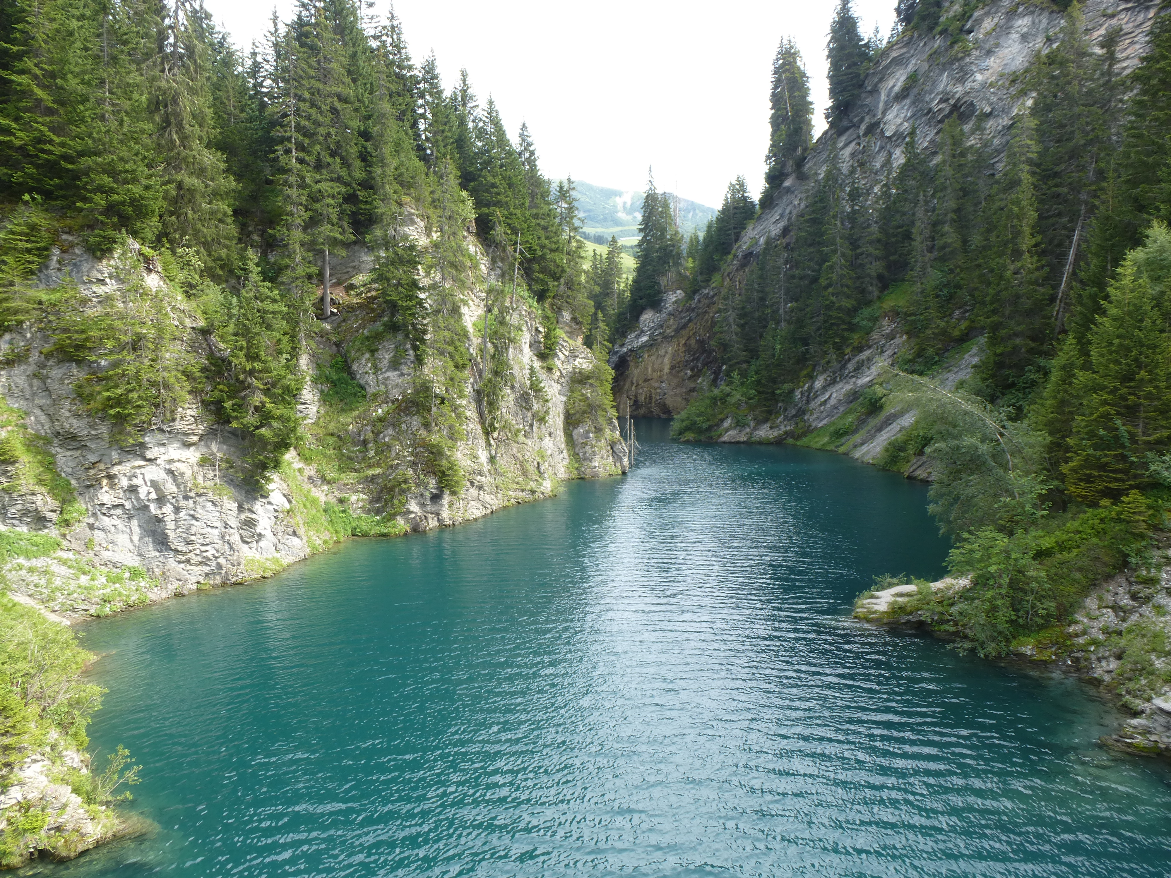 le lac de st guerin